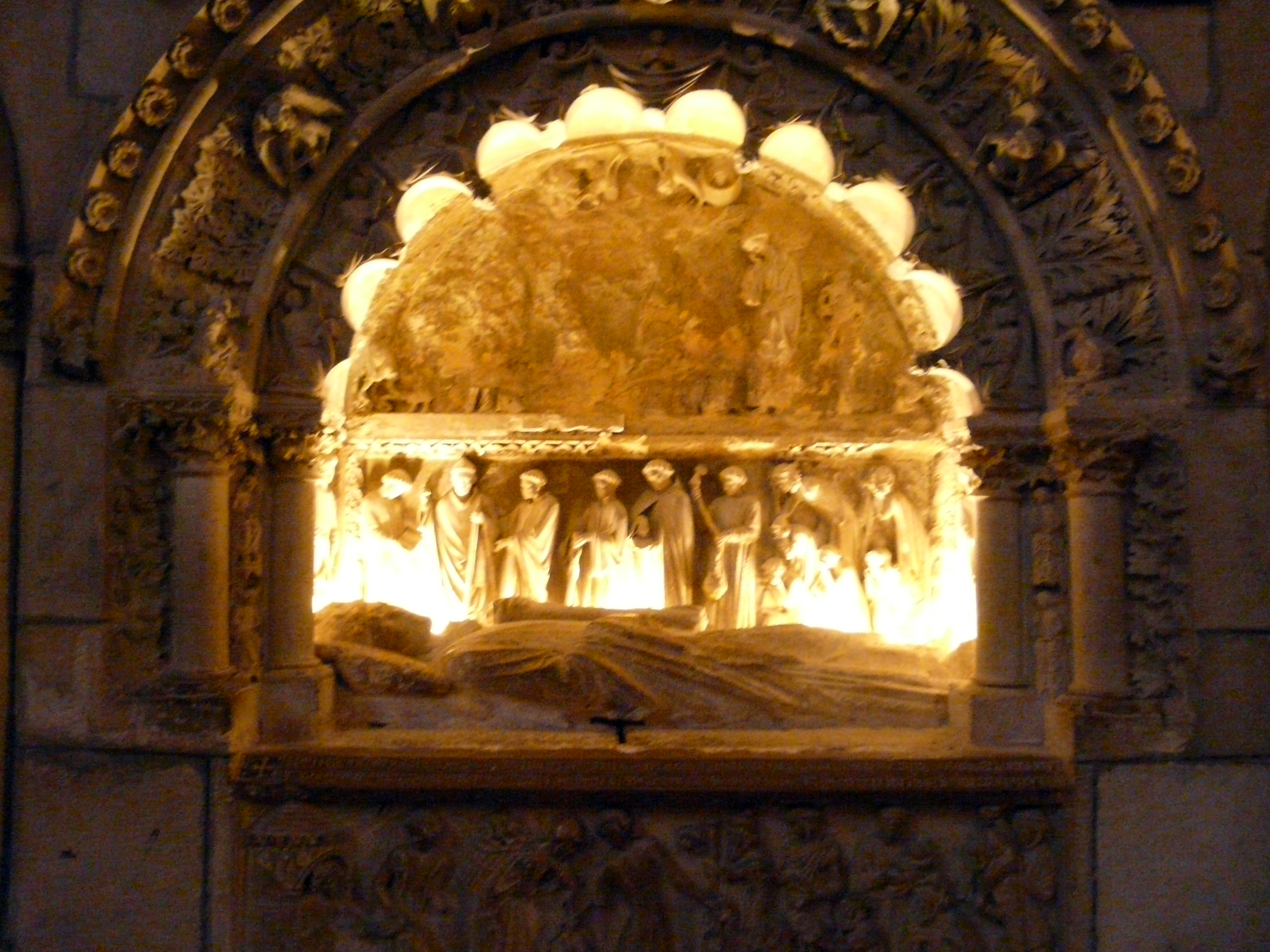 Sepulcro del obispo Martín "el zamorano", catedral de León